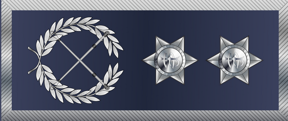 Distintivo de Intendente da PSP